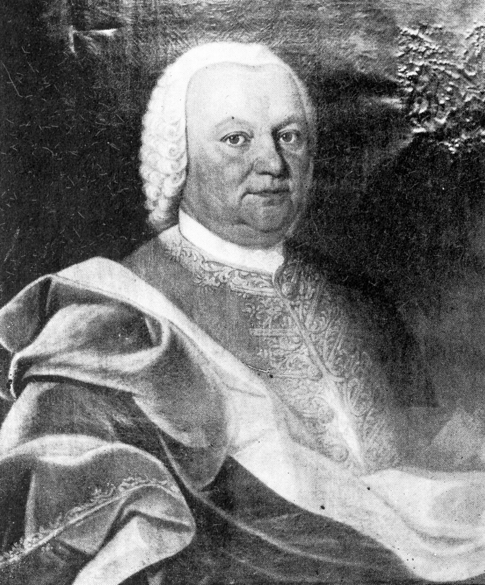 Wilhelm Remy (1702-1761) Hüttenherr aus Bendorf